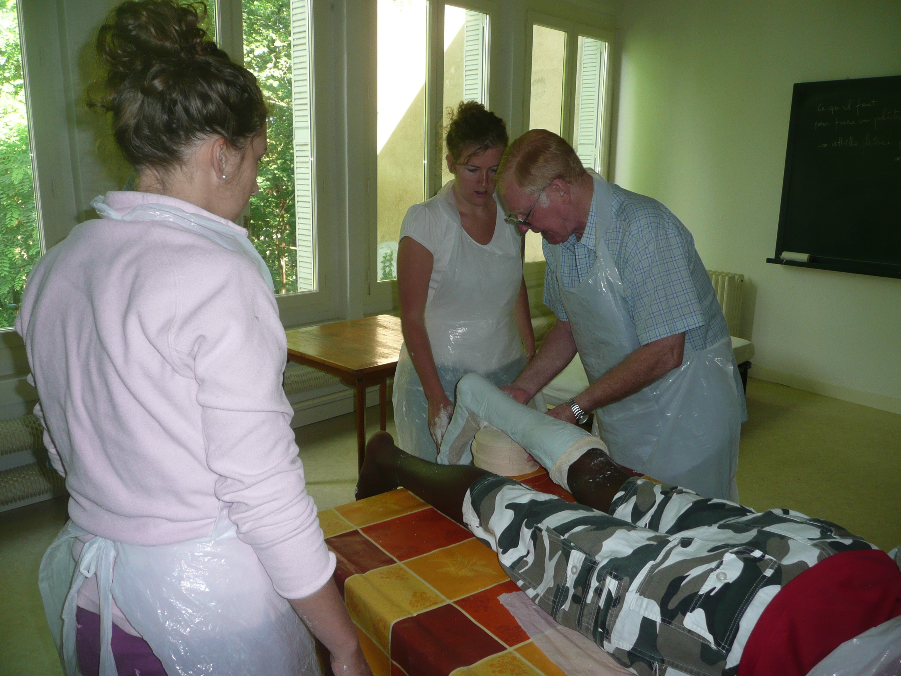 Séance de travaux pratiques sur la pose des plâtres réalisée dans les locaux de l'association AMM Formation